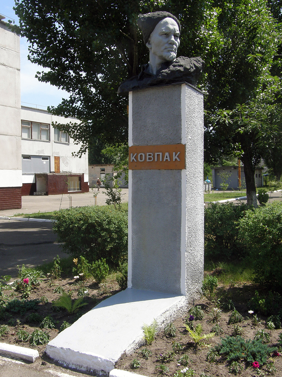 Пам'ятник Ковпаку С. А., радянському державному діячеві, командиру партизанського з'єднання, двічі Герою Радянського Союзу, учаснику ВВВ, Київ, Здолбунівська вул., 7-б